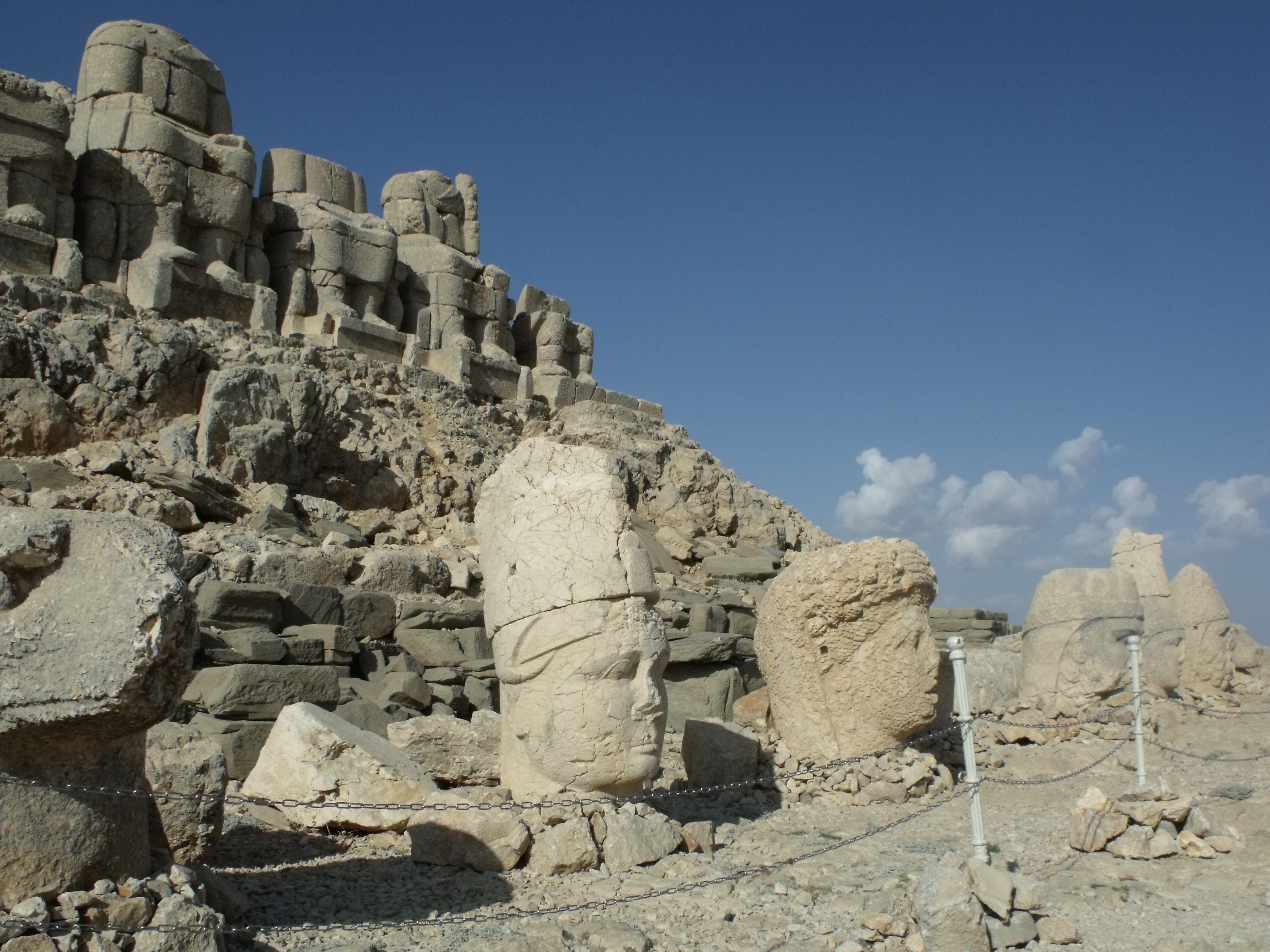 KİNG'S OF KOMMAGENNE 2009